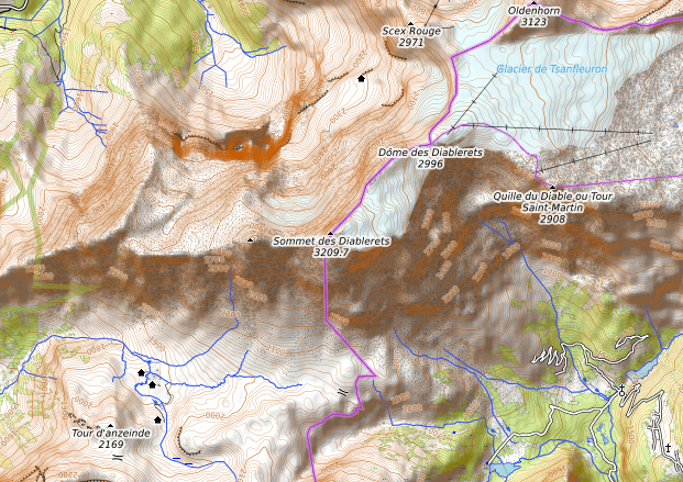 carte réalisée sur umap This map may be incomplete, and may contain errors. Don't rely solely on it for navigation.